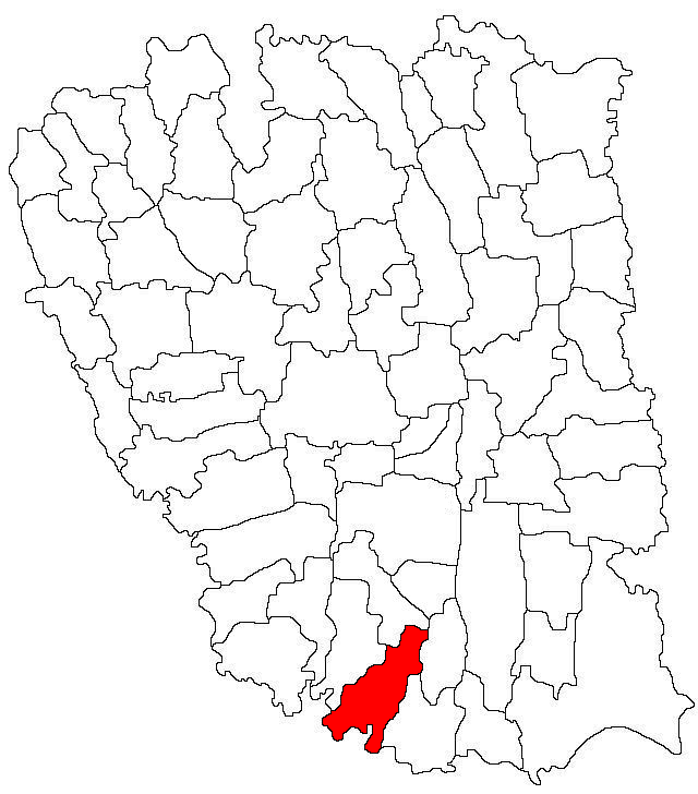 Categorie:Hărţi ale judeţului Galaţi